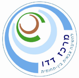 לוגו מכון דדו